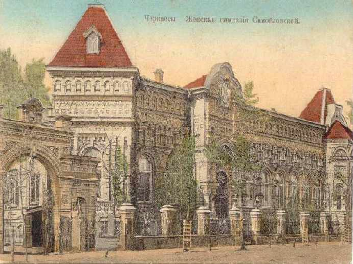 Жіноча гімназія Самойловської: Фото-листівка